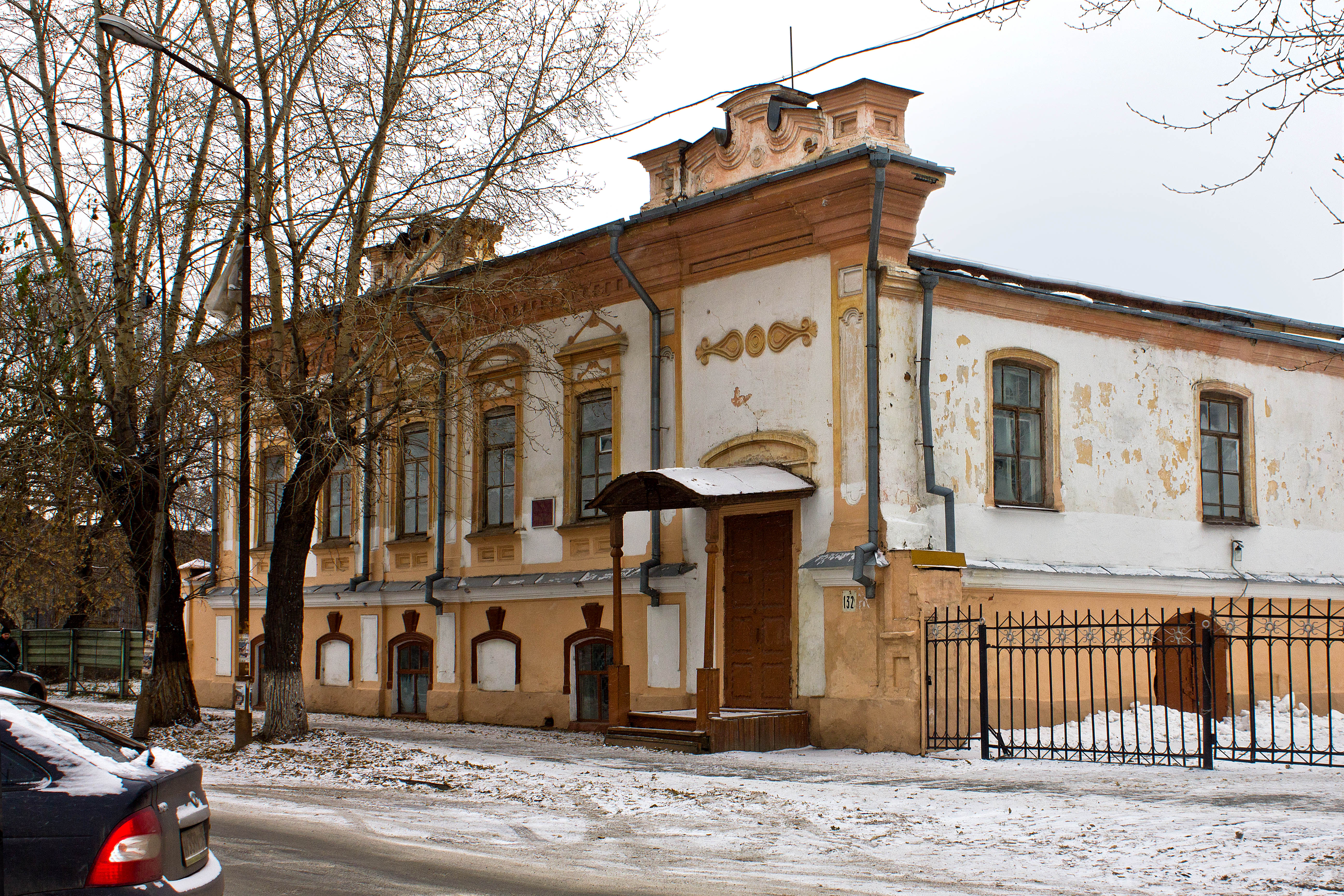 Дом купца Г.Т.Харламова (Курганская область, Курган, улица Советская, 132)